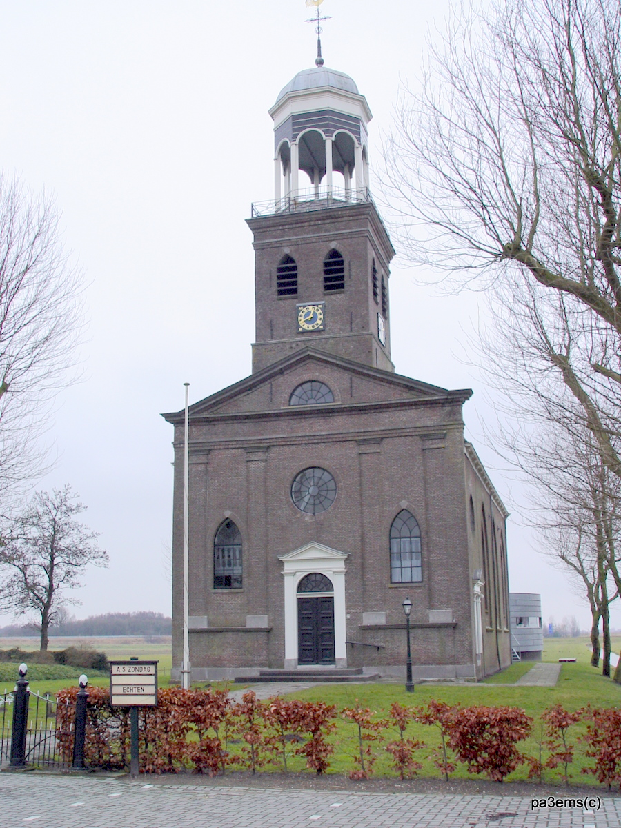 N.H. Kerk te Oosterzee (Gemeente Lemsterland}